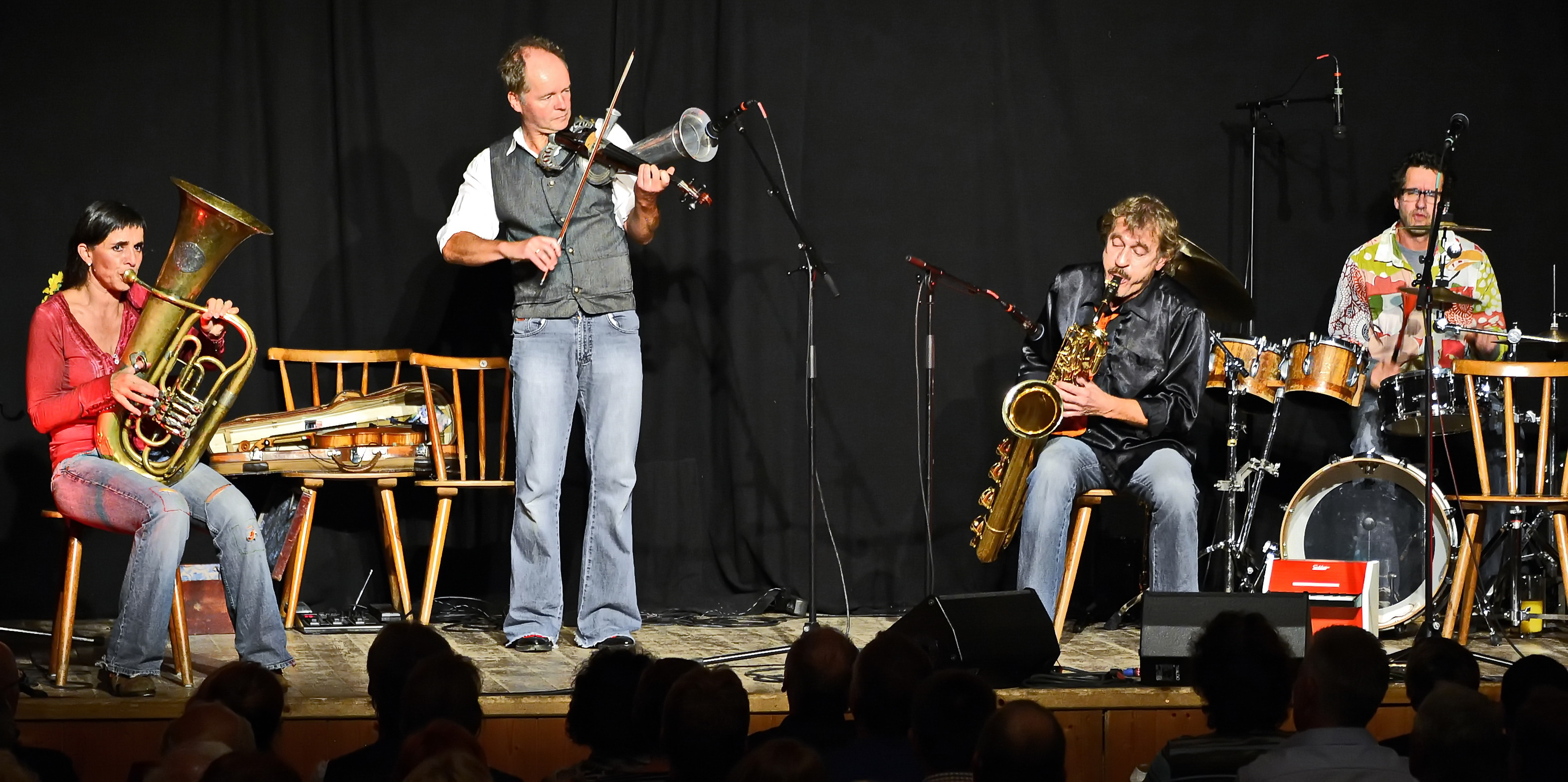 MonacoBagage